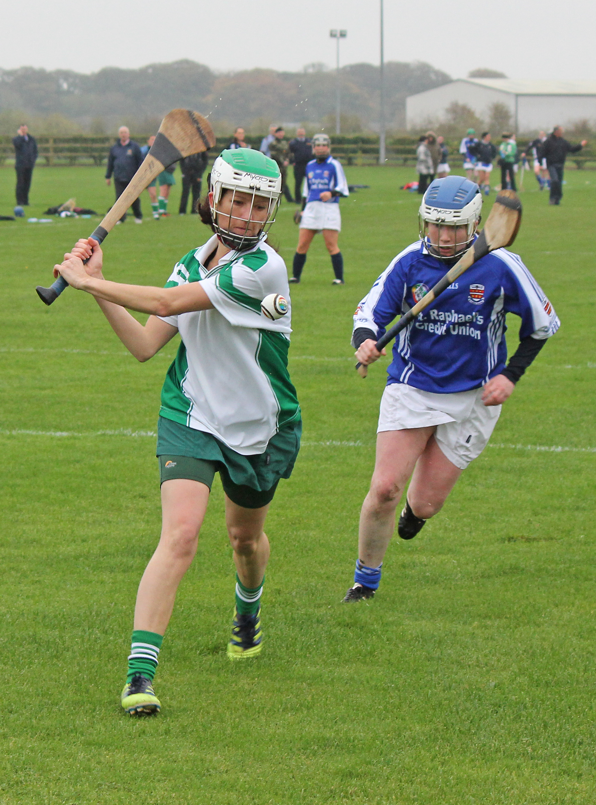 Camogie Game 24/10/12